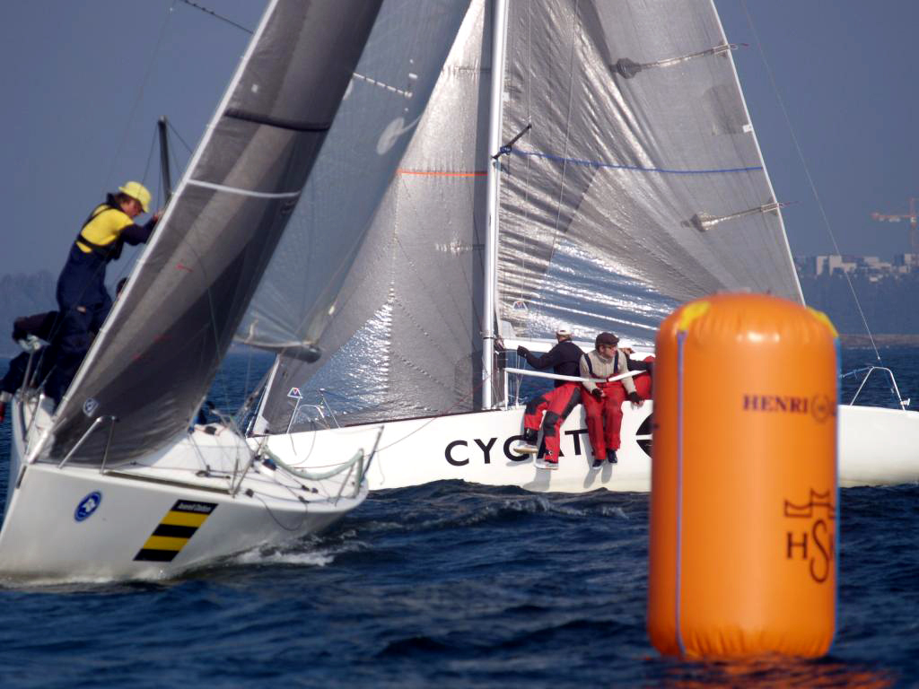 Platu 25, purjehduskilpailu, Suomen Urheiluveneliitto, Helsinki